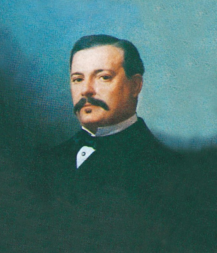 José Pascual López Cortón 1817-1878